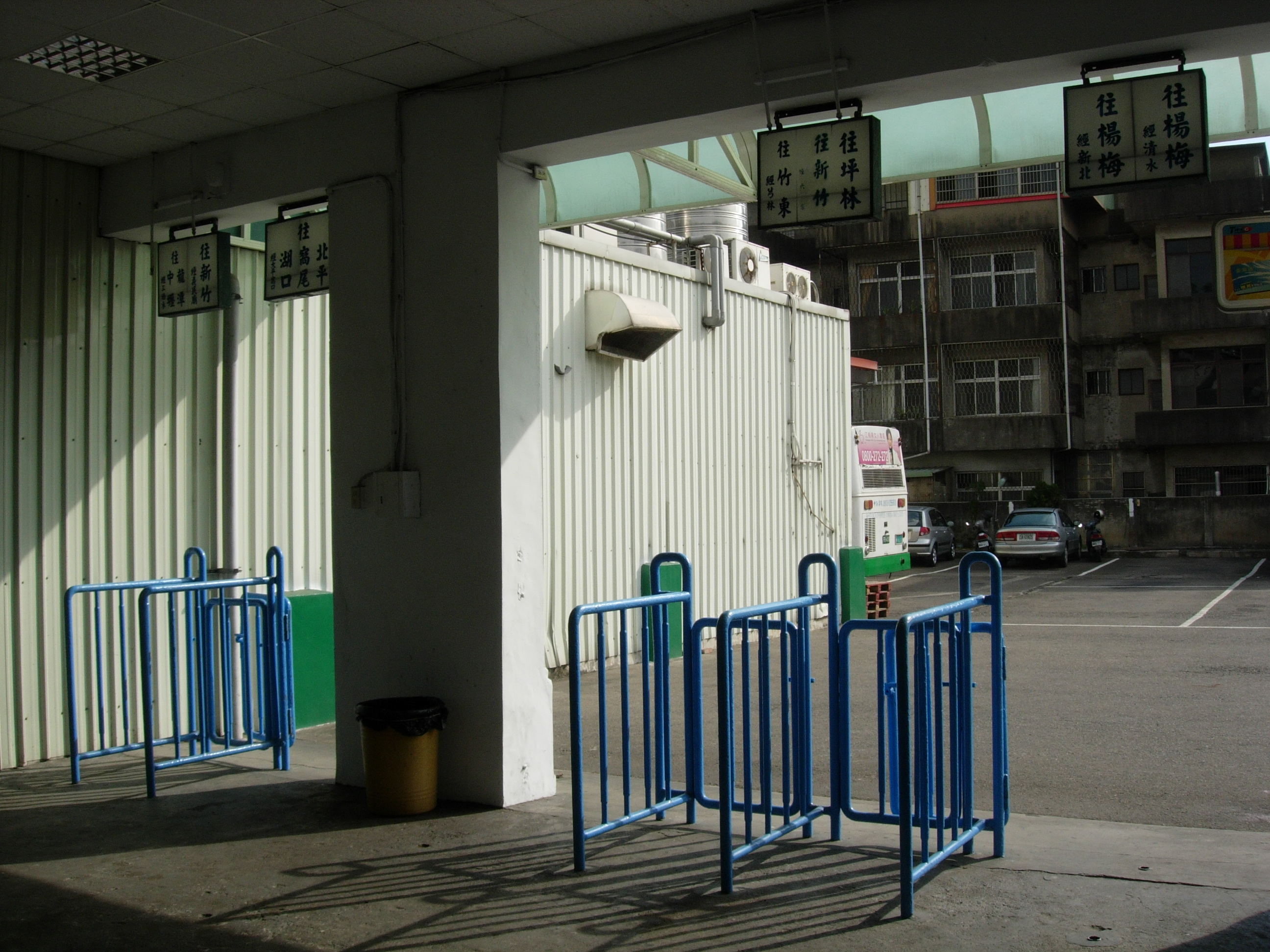 中文（台灣）: 新竹客運新埔站月台1